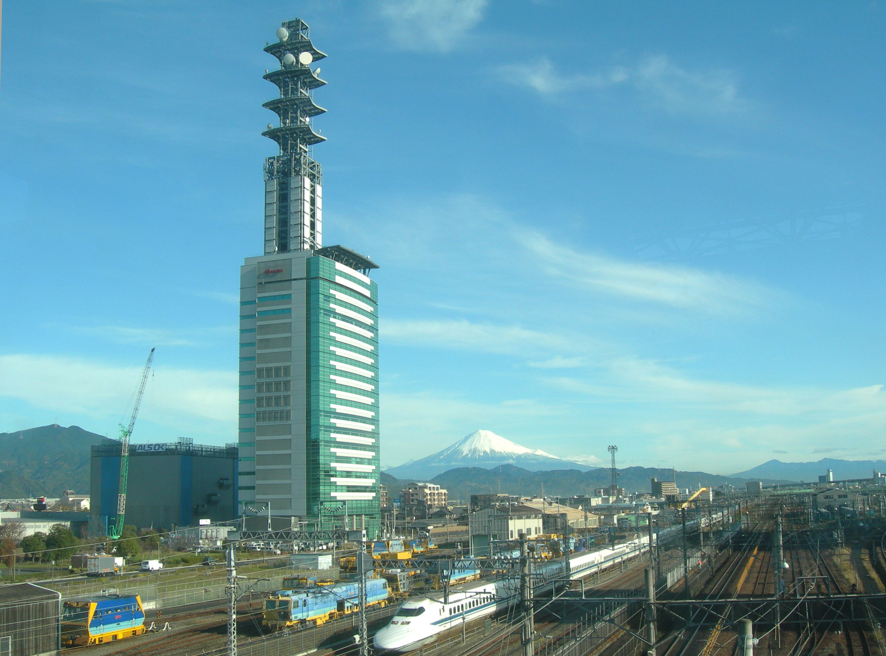 東静岡駅周辺の風景(NTTドコモ東海静岡ビル・富士山・東海道新幹線700系)